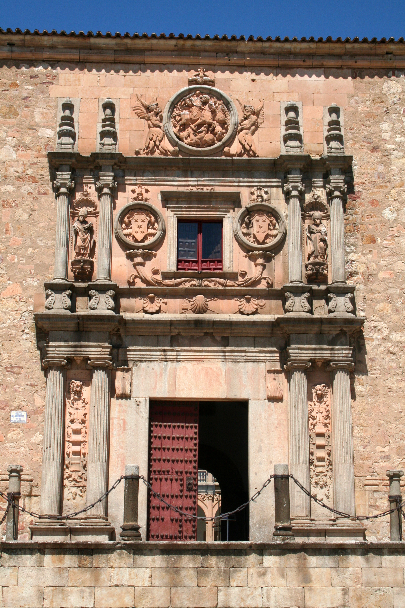 Façade van het Colegio Mayor de Santiago el Zebedeo